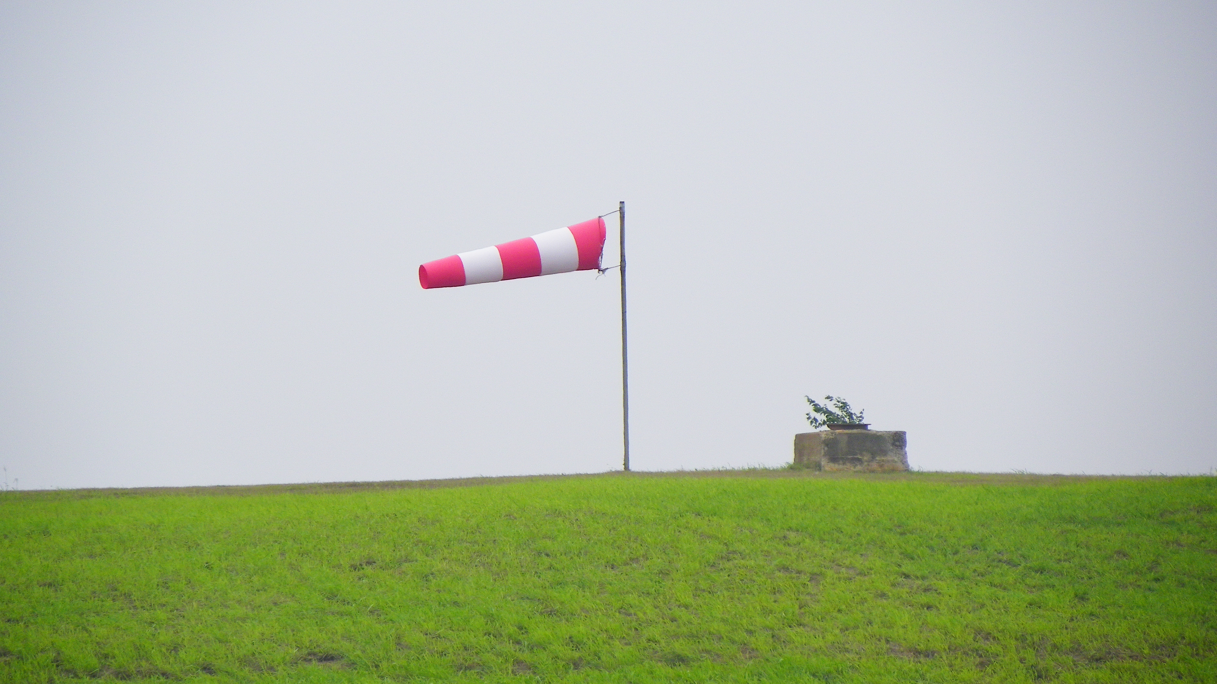 中文（台灣）: 空軍清泉崗基地的風向袋。